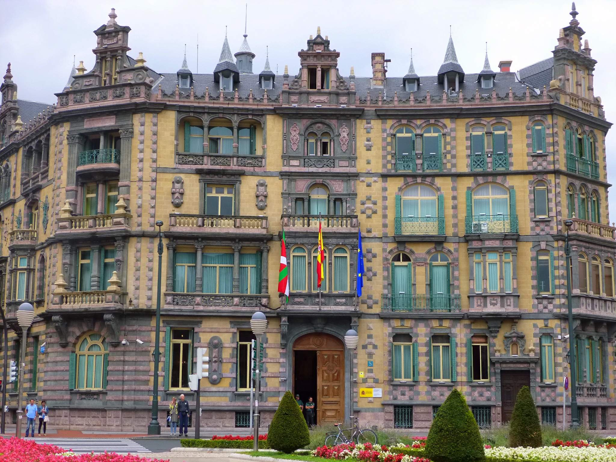 Plaza Moyúa y Palacio Chávarri (Subdelegación del Gobierno), en Bilbao